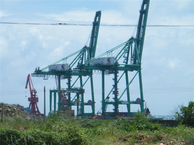 广澳港一期工程1、2号泊位